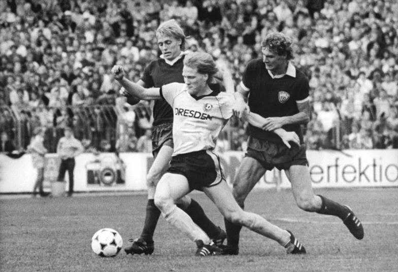 ADN-ZB-Häßler- 24.9.88-Dresden: Fußball-Oberliga- 6. Spieltag- Dynamo Dresden - BFC Dynamo 2:1 Der Dresdner Mittelfeld-Spieler Matthias Sammer hat es hier gleich mit zwei Gegnern zu tun. Rainer Ernst (l) und Hendrik Herzog. Am Ende konnte er mit seiner Mannschaft jubeln. Vor einer Kulisse von 36 000 Zuschauern behaupteten die Dresdner die Tabellenspitze.